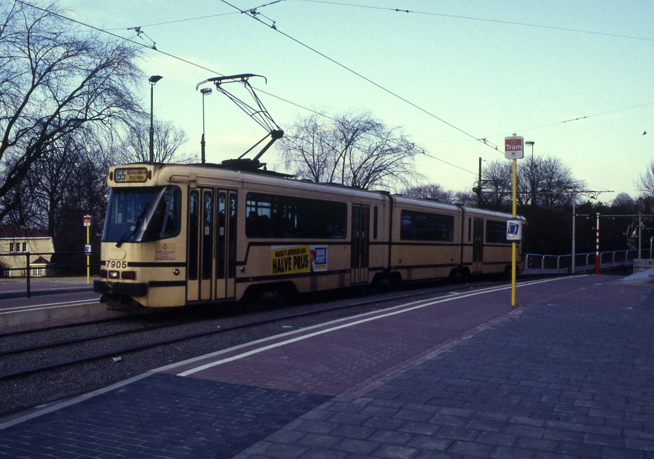 Tram van lijn 55 op de nieuwe route